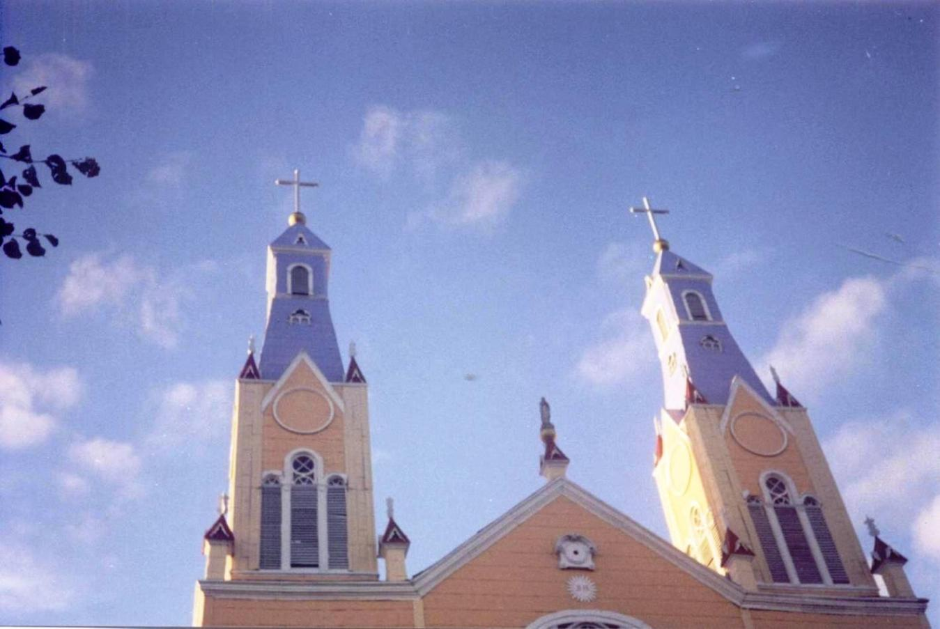 Torres principales de la iglesia San Francisco, Castro, Chiloé, Chile.